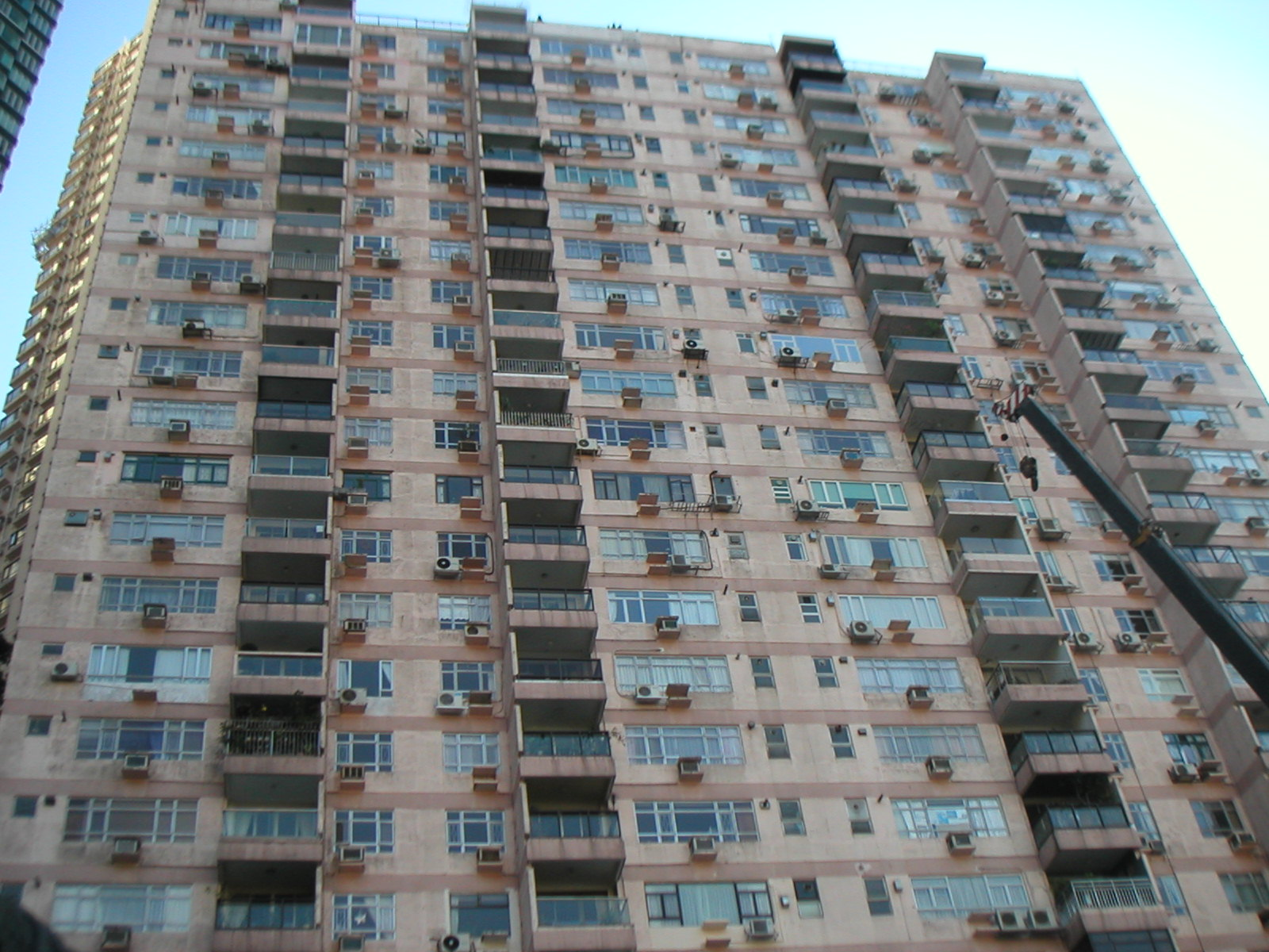 龍園 粵語: 龍園